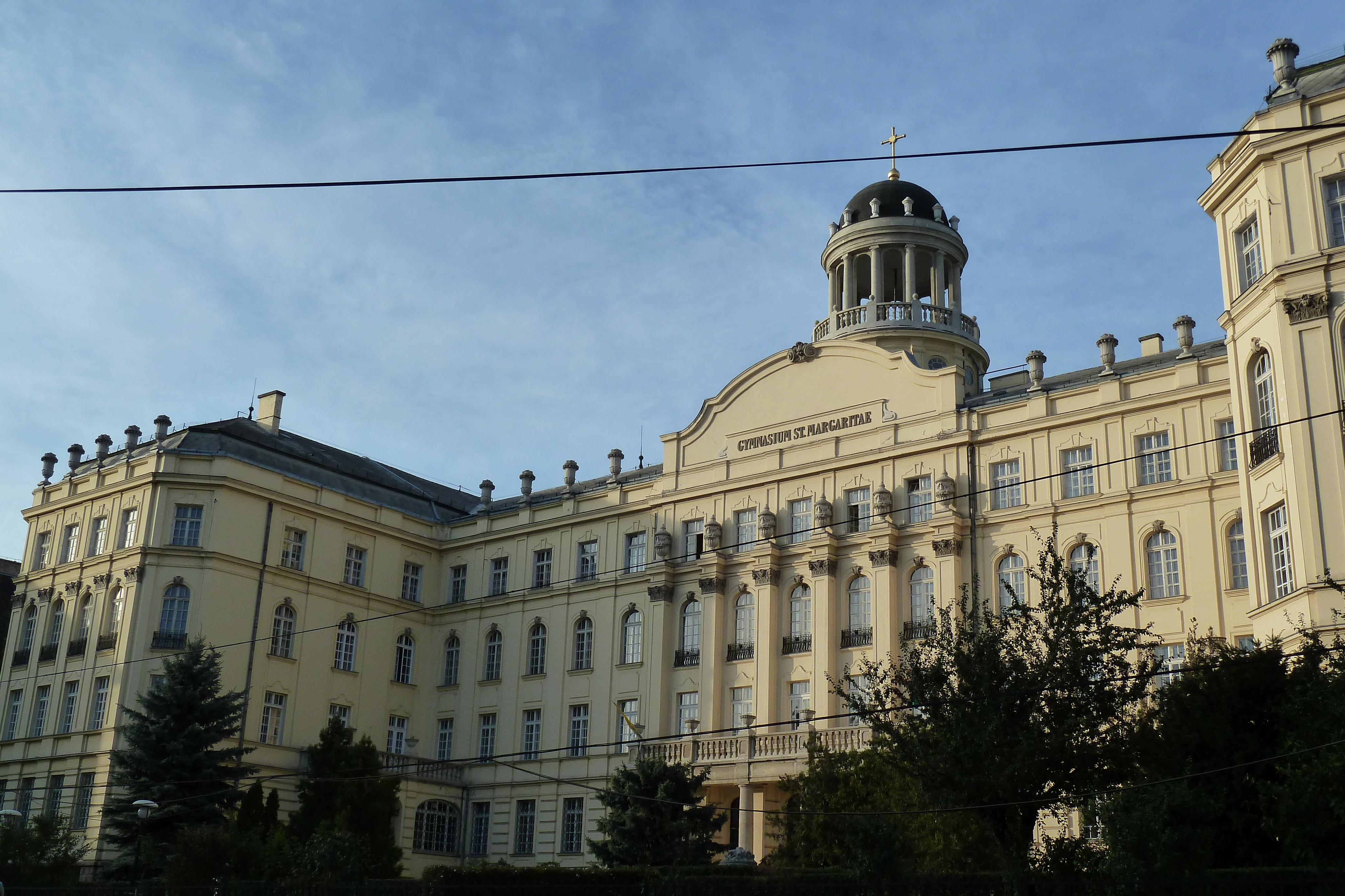 Kaffka Margit Gimnázium (Budapest 11, Villányi út 5-7.)